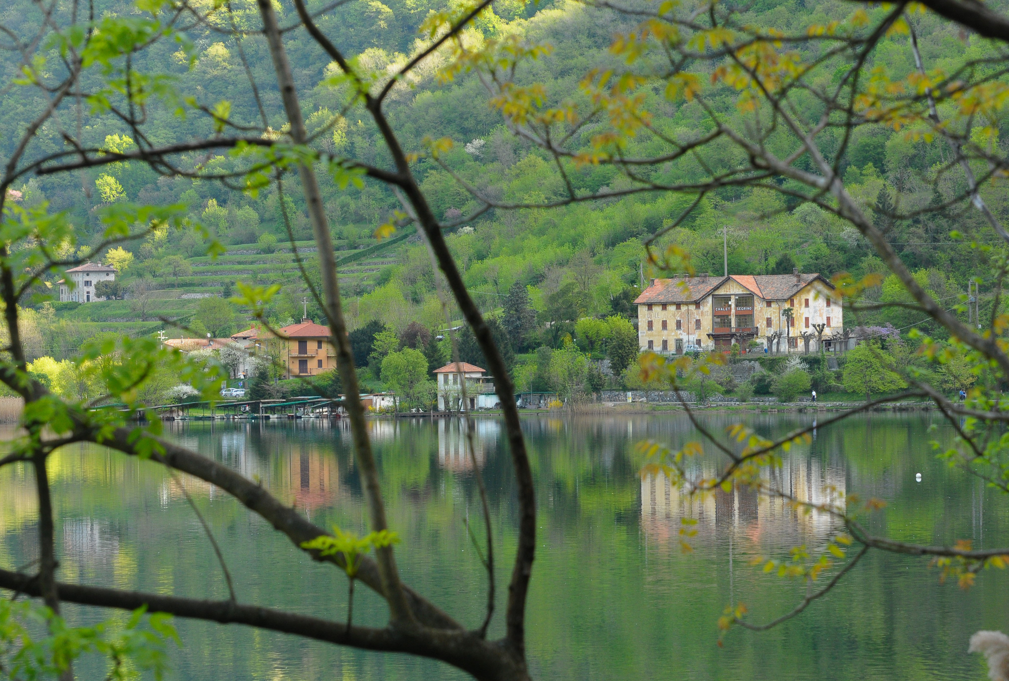 Il vecchio abbandonato Chalet Segrino dalla sponda del lago